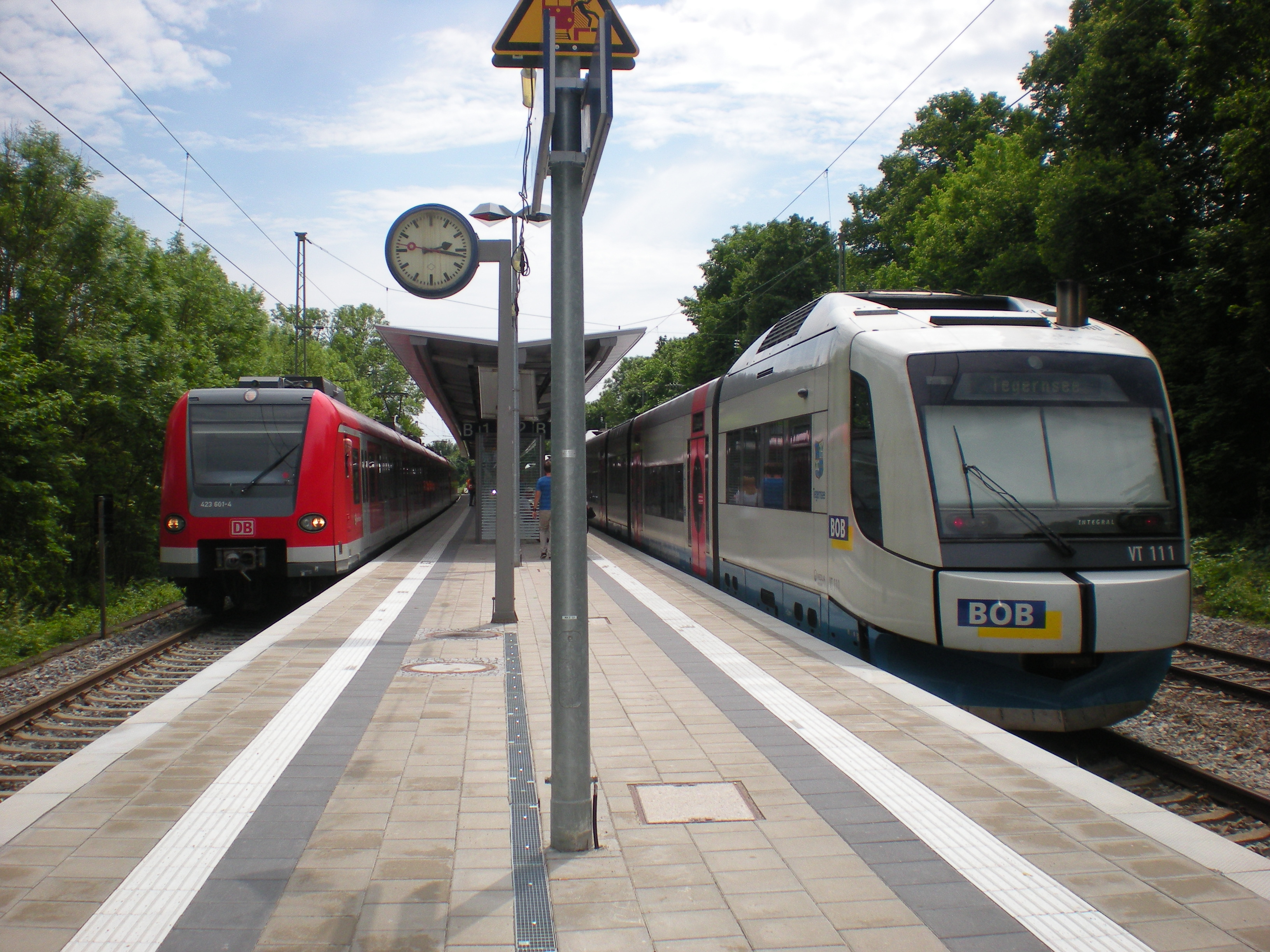 Bahnsteig des S-Bahnhofs München-Harras mit einer S-Bahn (links) und einem Zug der Bayerischen Oberlandbahn (rechts)